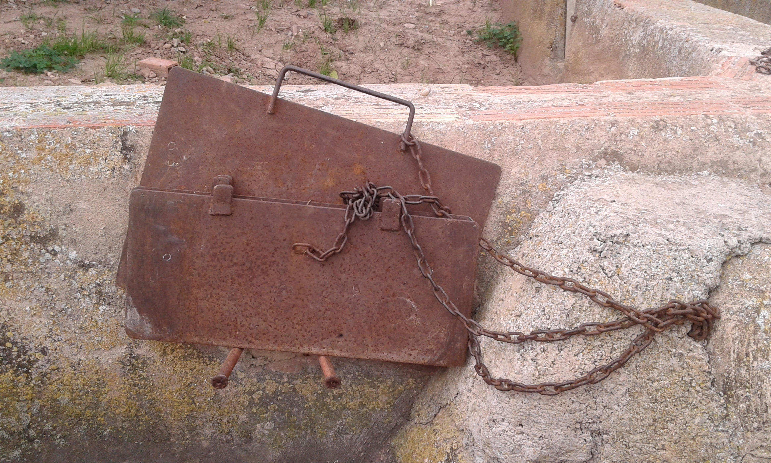 Costers a l'horta de Massalfassar per fer la parada de la séquia (també estelladó, estellador, estallador, testellador, trastallador, talladora, post, partidor...)